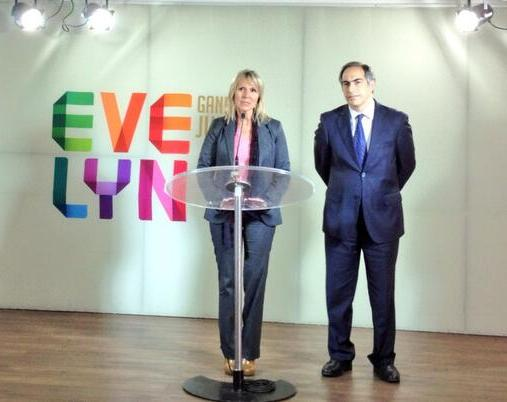 Lily Pérez, vocera del comando de Evelyn Matthei, junto a Francisco Chahuán, senador Quinta Región costa.